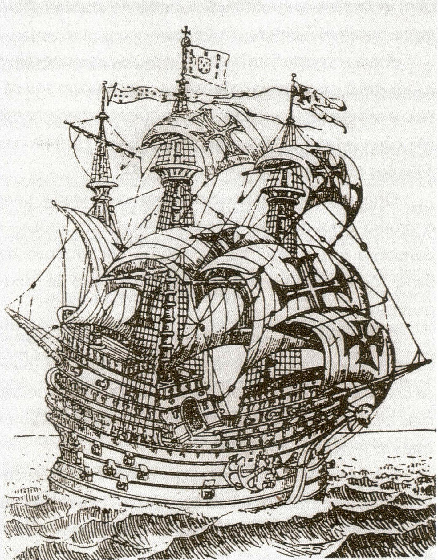 O galeão português "Frol de la Mar". Gravura no "Roteiro de Malaca" (século XVI).